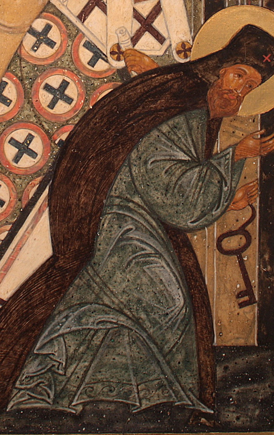 Ключарь отец Александр Хотовицкий спасающий ключи от Храма Спасителя. Фрагмент VI клейма иконы Новорусская Богоматерь — «Пришествие большевиков, 1917 г.». Техника: дерево, левкас, темпера.